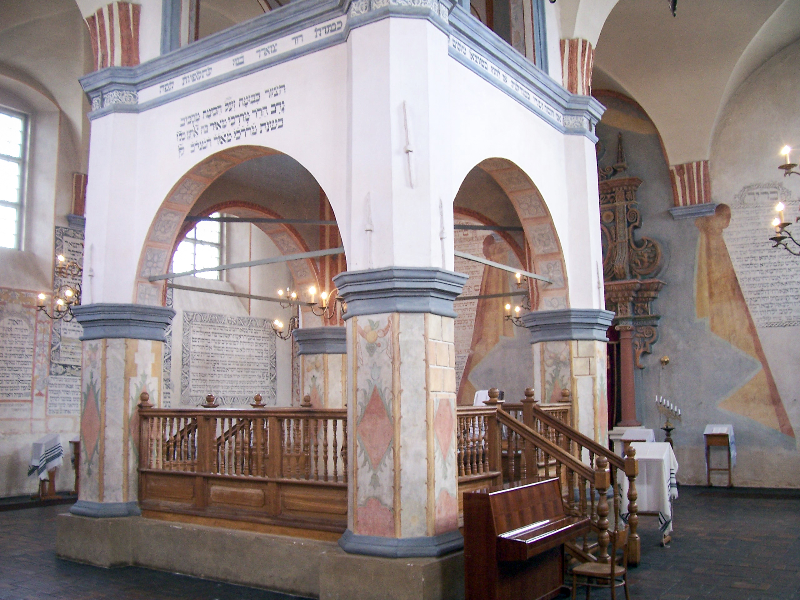 synagoga (duża), ob. muzeum Tykocin, ul. Kozia 2, Tykocin